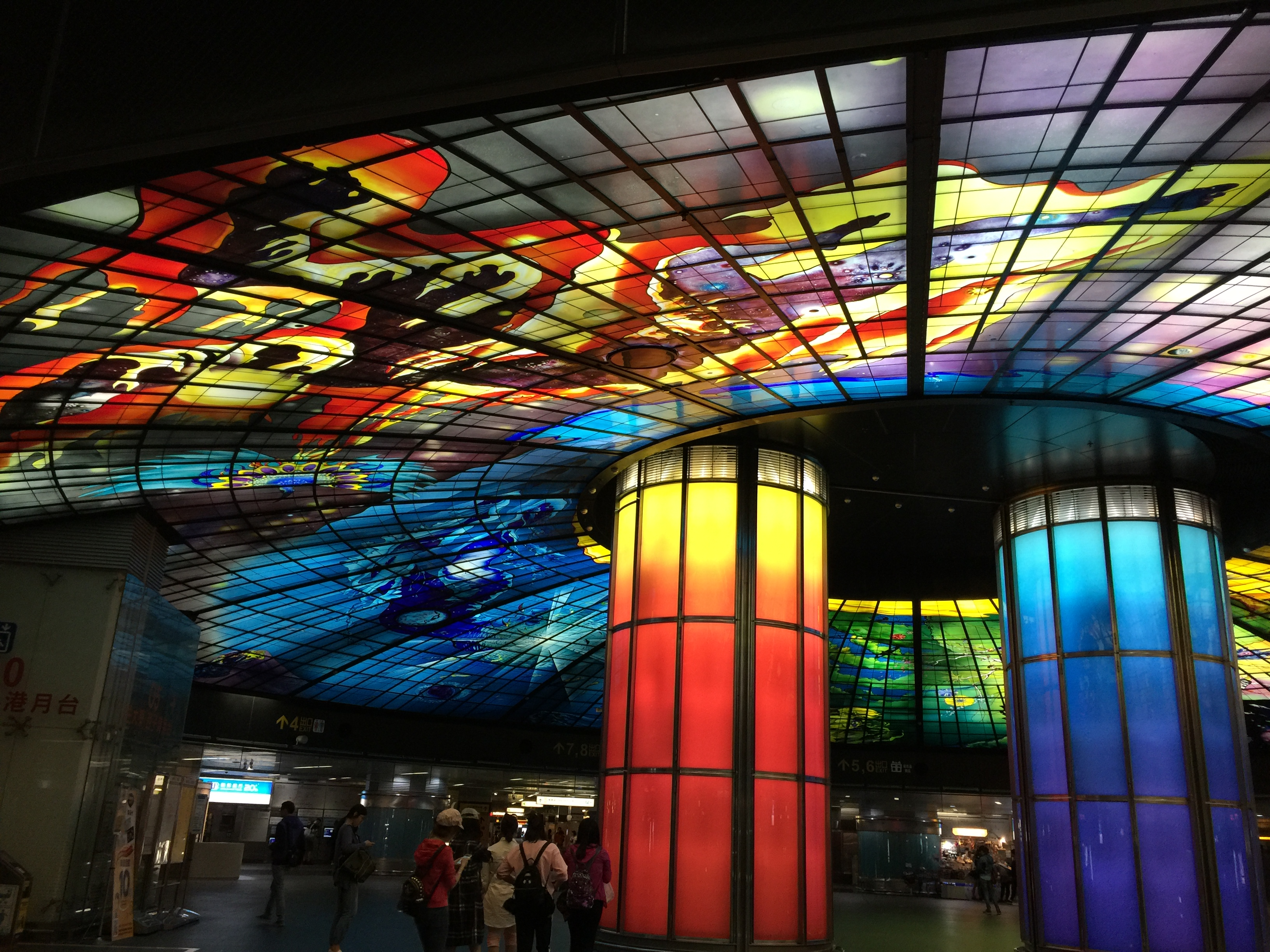 Lichtdom